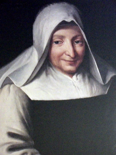 Portrait sur toile de Marie Poussepin au XVIIIe siècle.